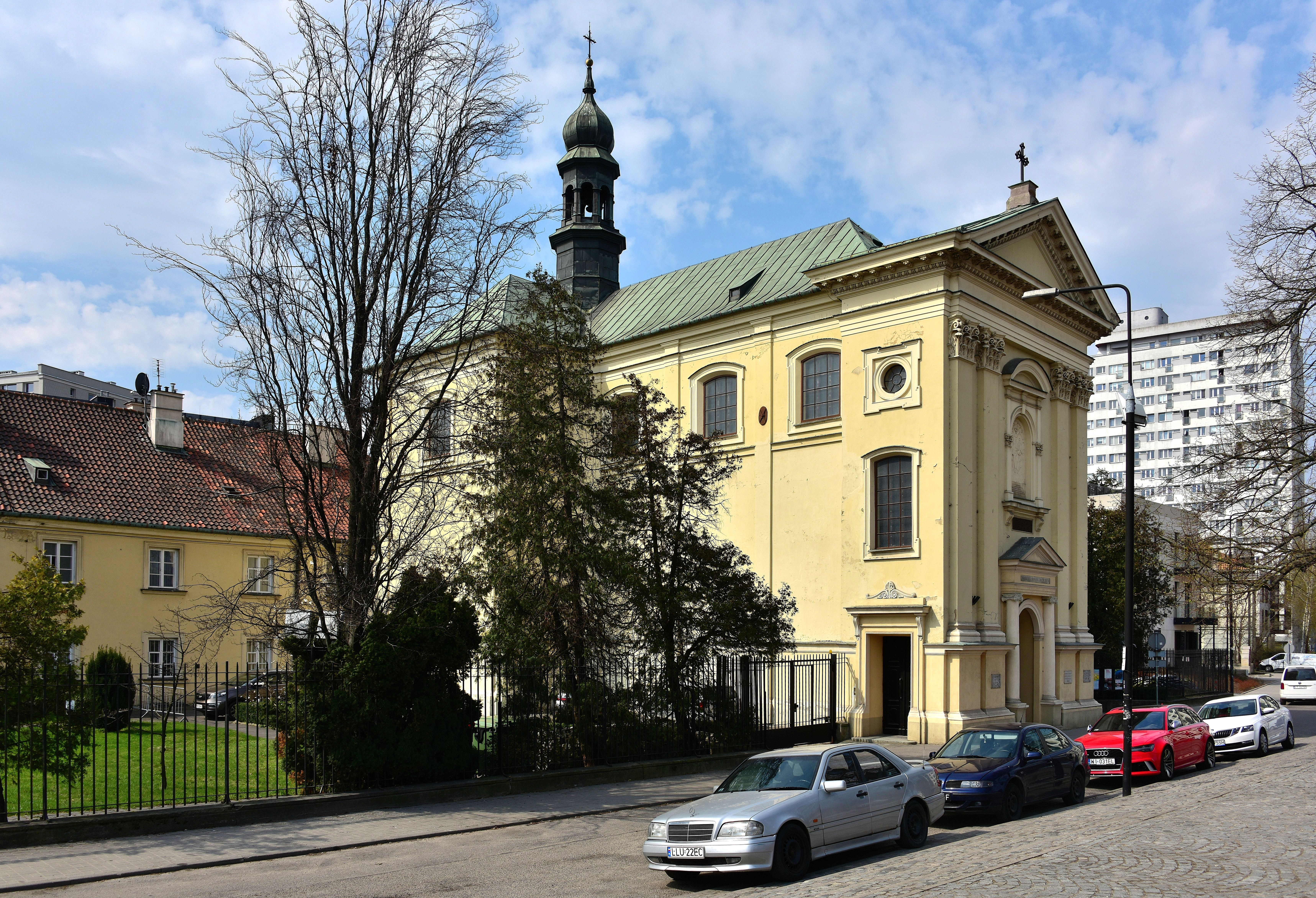 Kościół św. Trójcy na Solcu